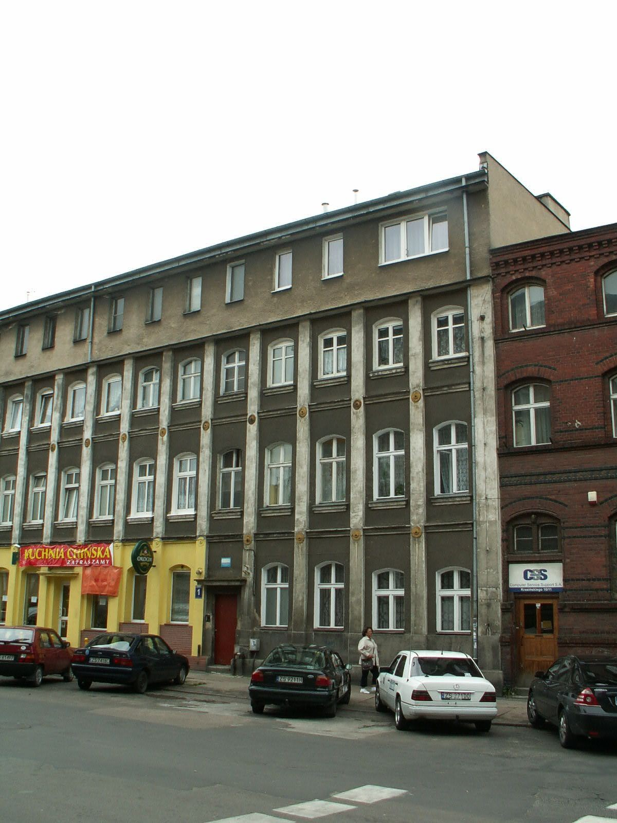 Synagogue in Szczecin (NW Poland). Synagoga w Szczecinie